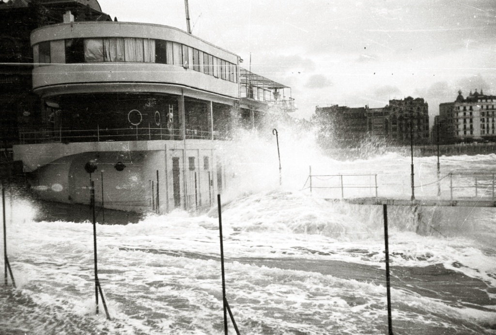 Título original: Temporal de mar. Olas azotando el Club Naútico (3/3) Localización: San Sebastián (Guipúzcoa)